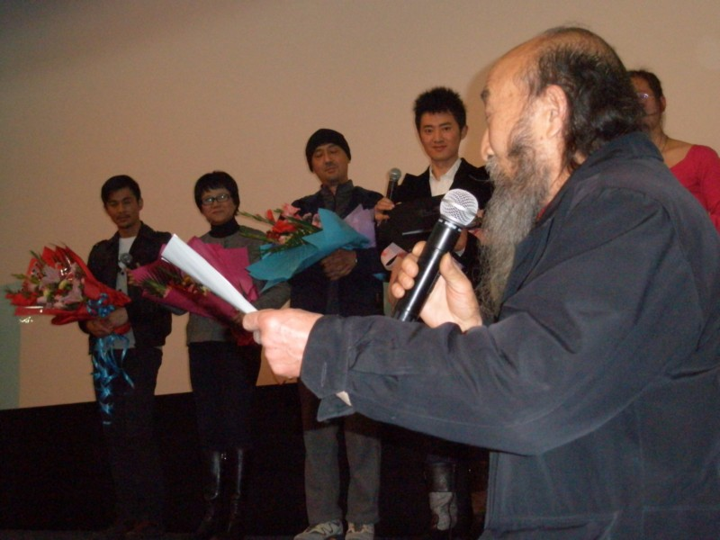 电影孔子南京观众见面会